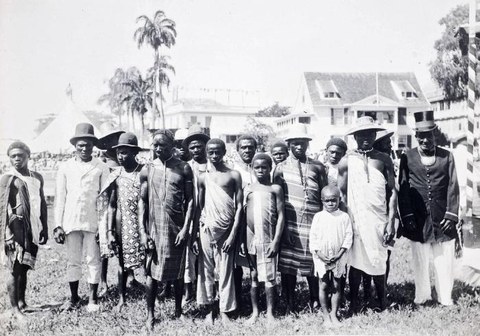 Foto. Groepsportret in Paramaribo waarschijnlijk etr gelegenheid van emancipatiedag og koninginnedag.. Portret van een groep Marrons op het Gouvernementsplein tijdens een feestelijke aangelegenheid